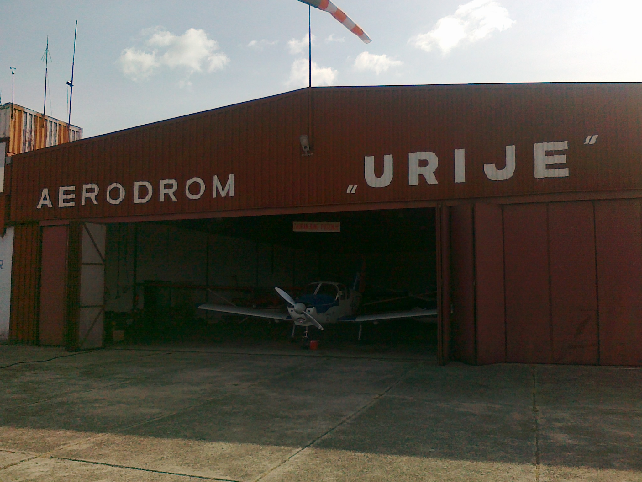 Aerodrom Urije, Prijedor